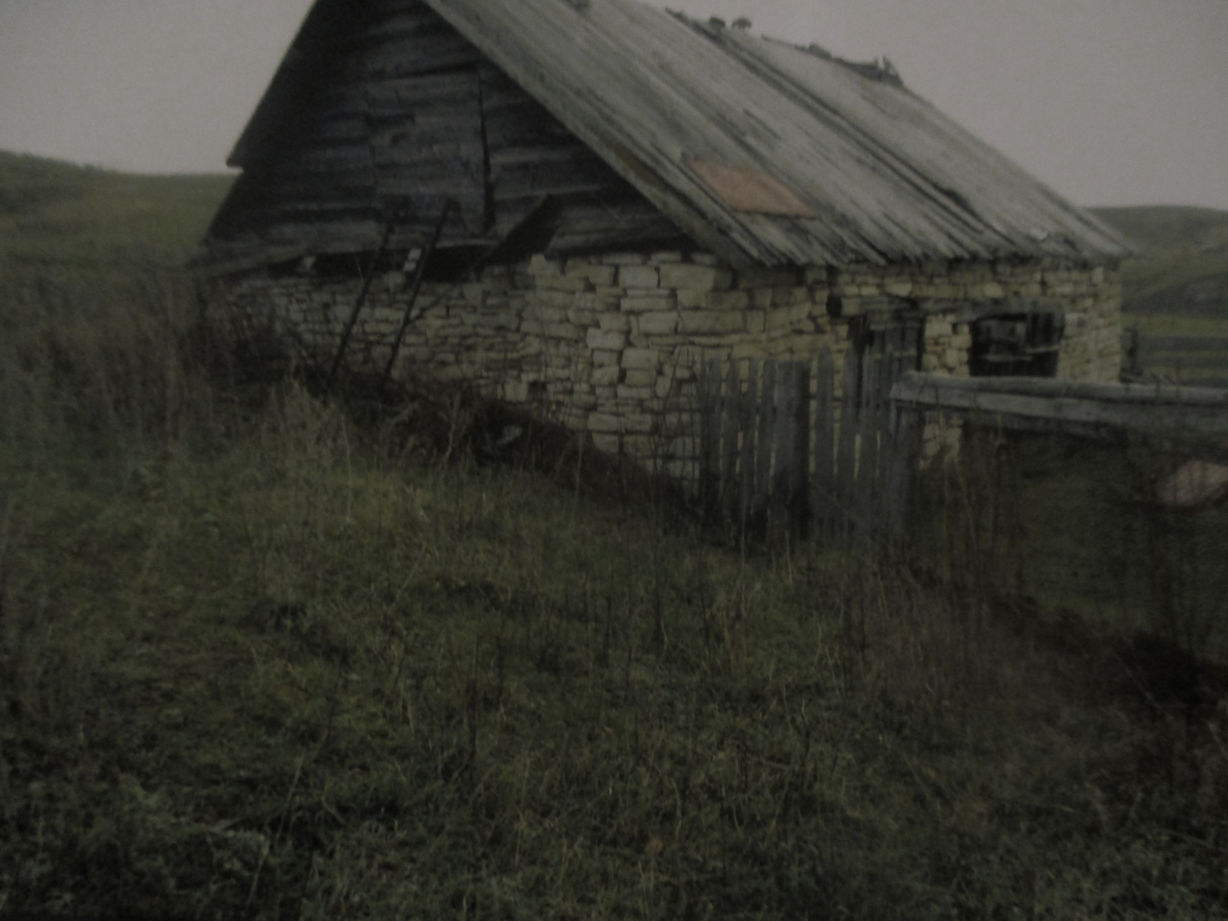 Мастерская Зиннатуллы.Она до сих пор жива.